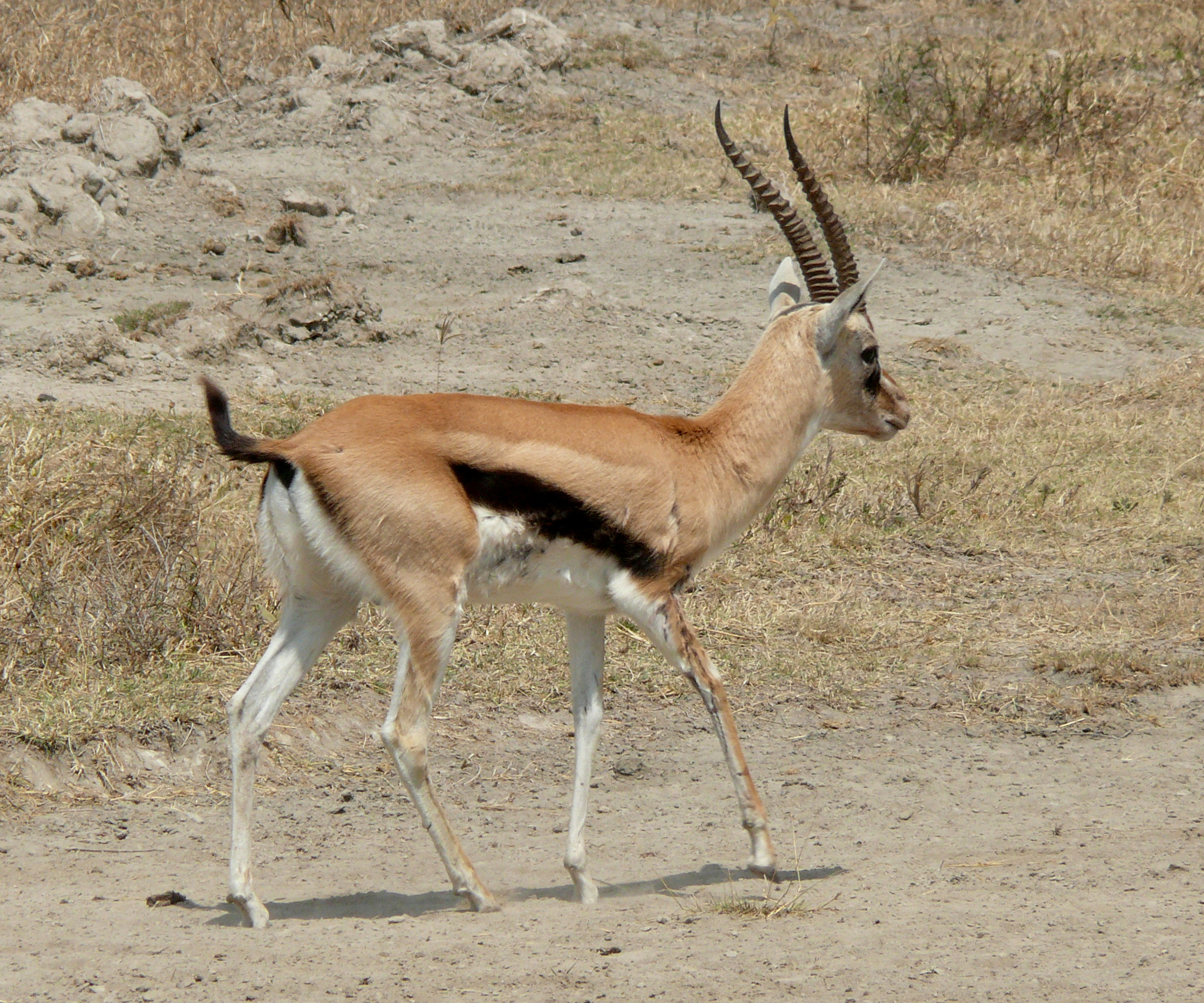 Thomsongazelle (Eudorcas thomsonii)